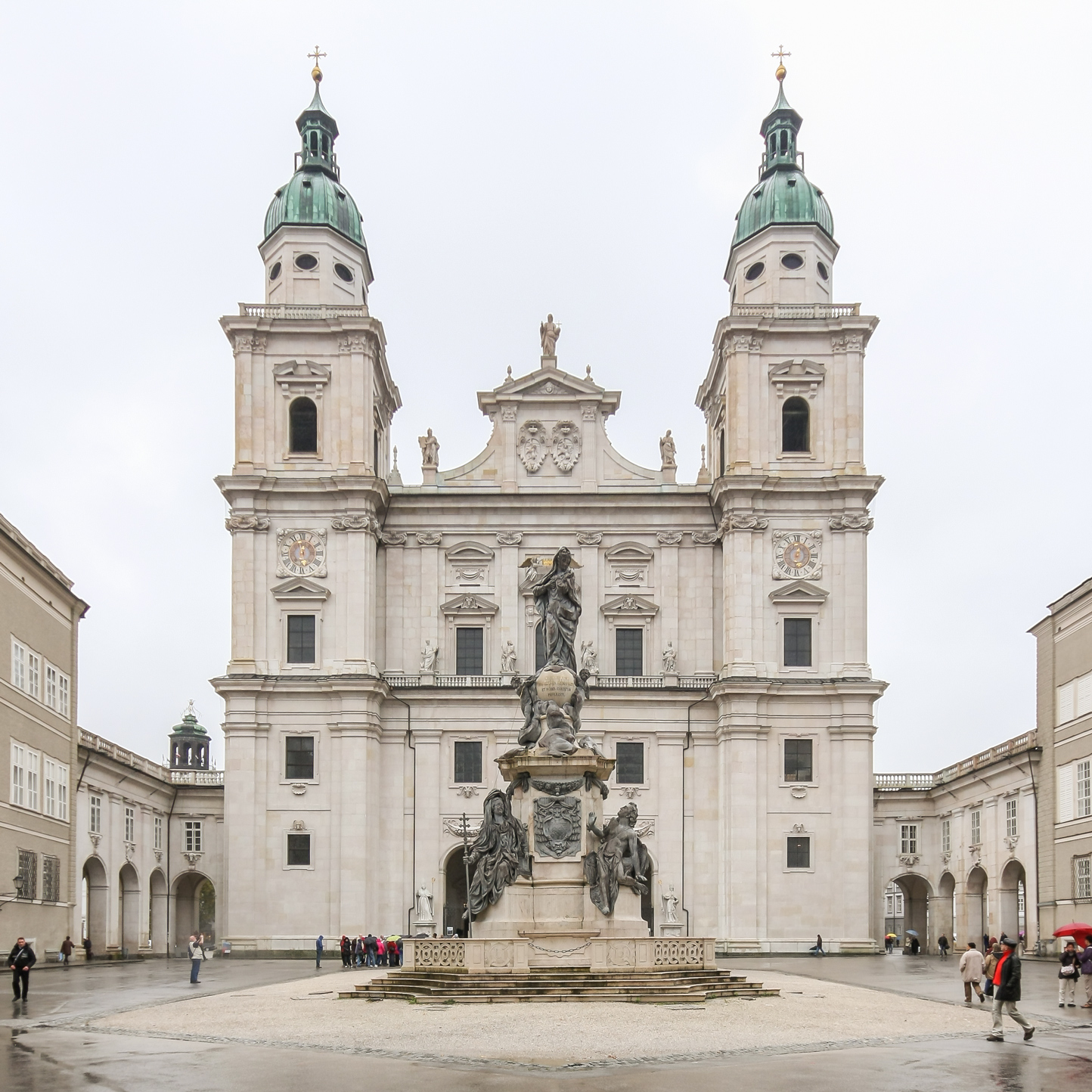 Die Fassade des Salzburger Doms am Domplatz. Davor die Mariensäule.